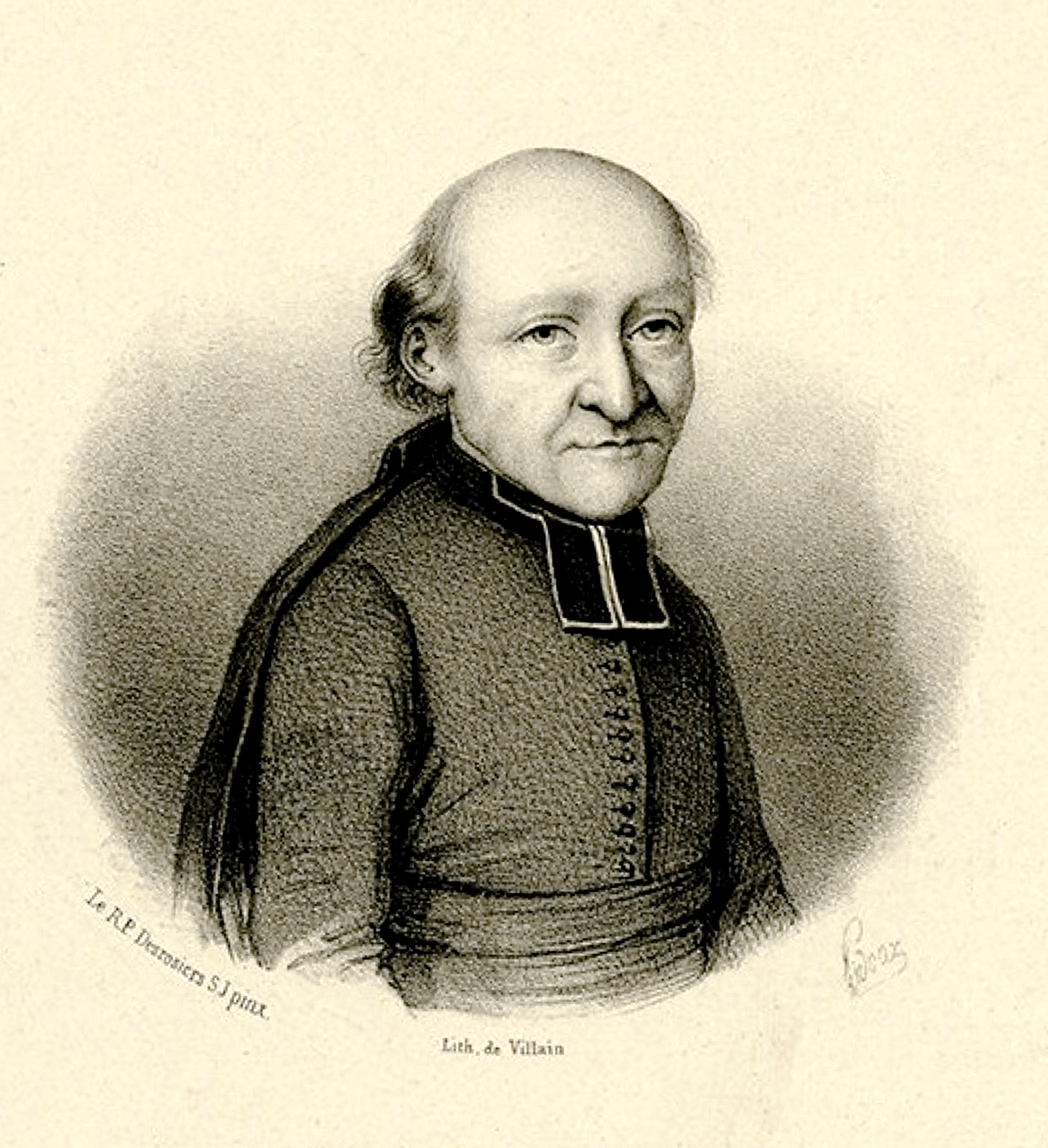 Augustin Barruel, par Auguste Pidoux (1809-1870), d'après Desrosiers. Lithographie publiée à Paris par A. Boblet.